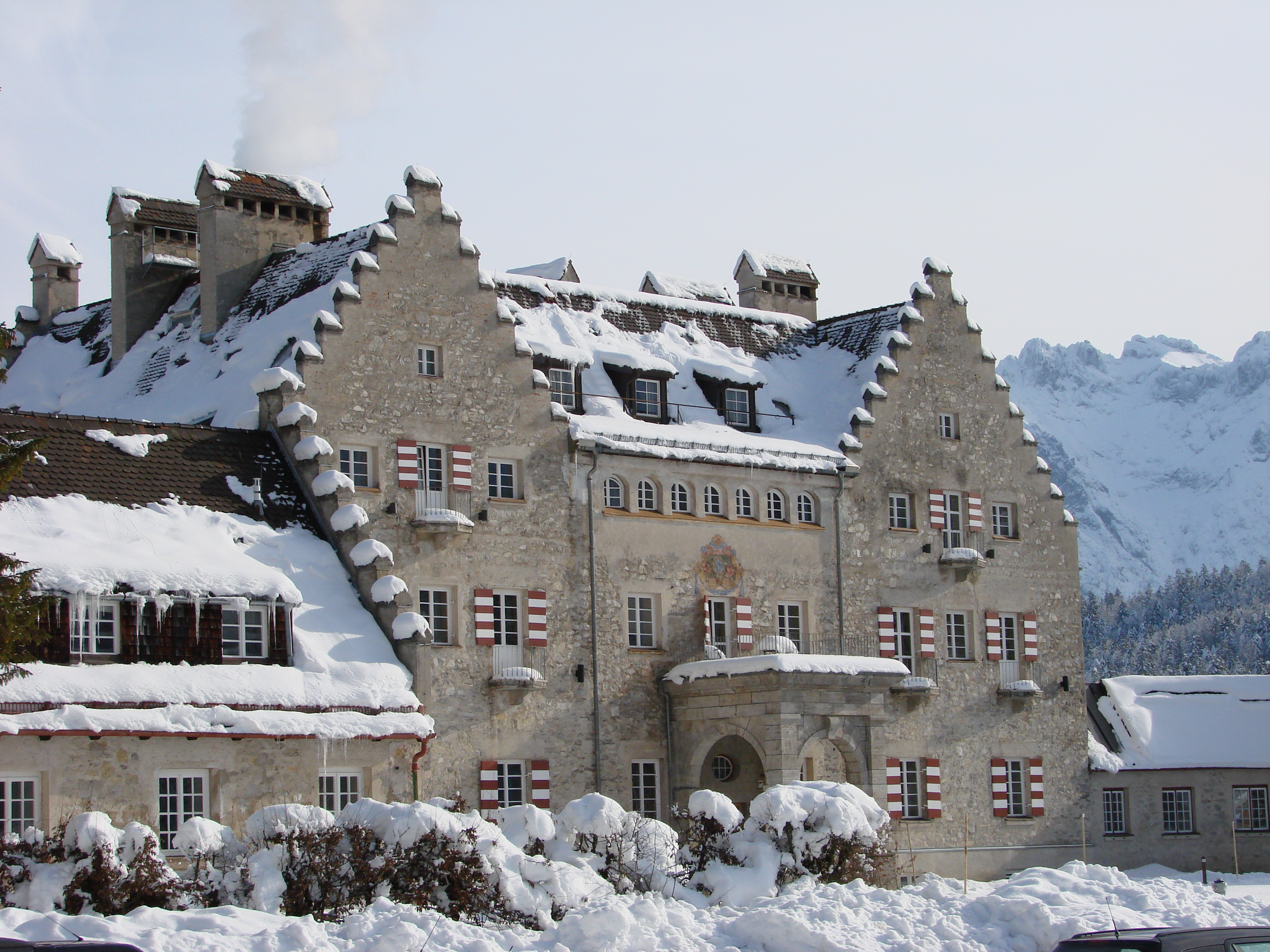 Schloss Kranzbach (Landkreis Garmisch-Partenkirchen) Germany